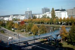 Saarbrucken on 08 10 2005